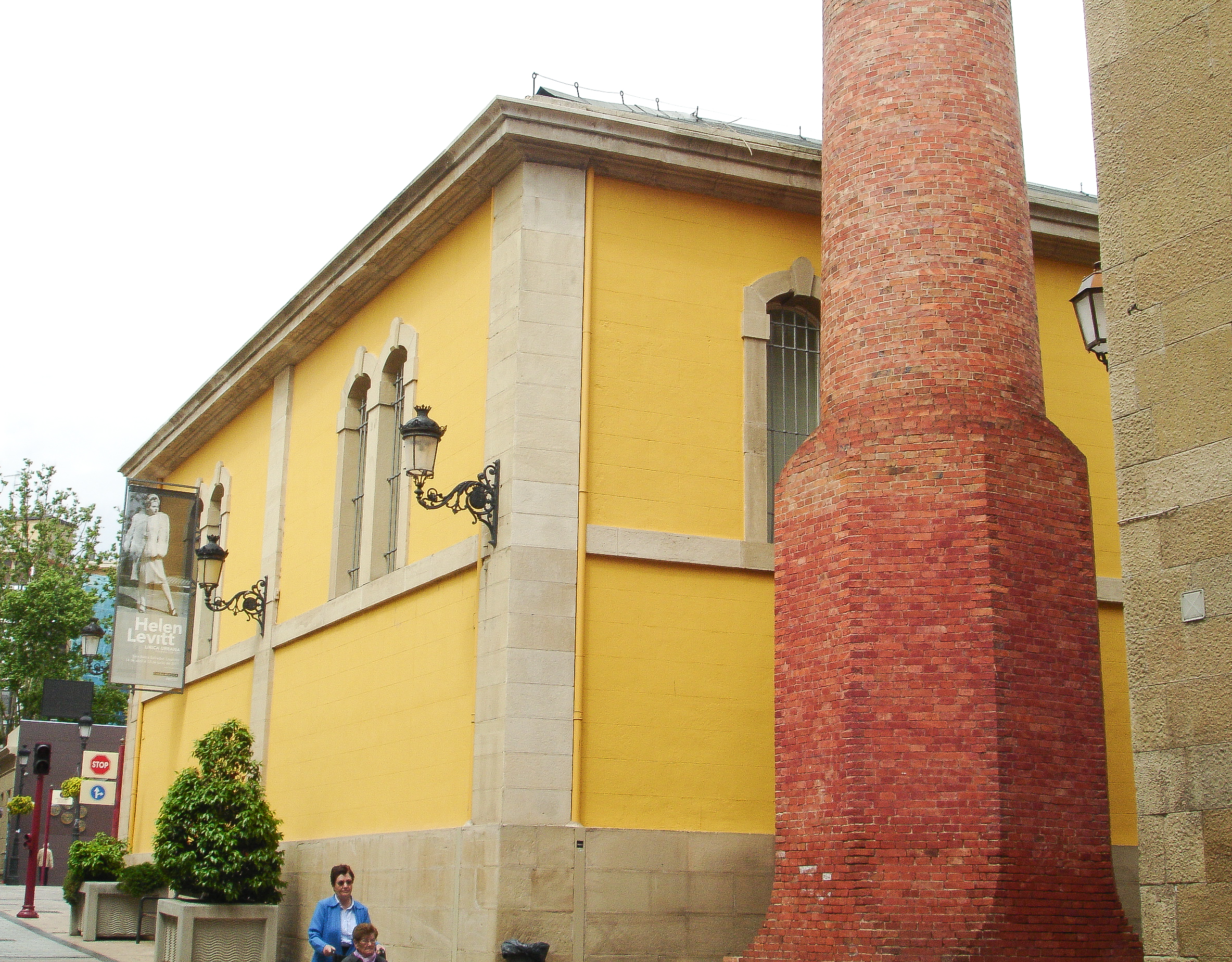 Fachada lateral. Antigua chimenea de la fábrica de tabacos, Logroño (La Rioja)